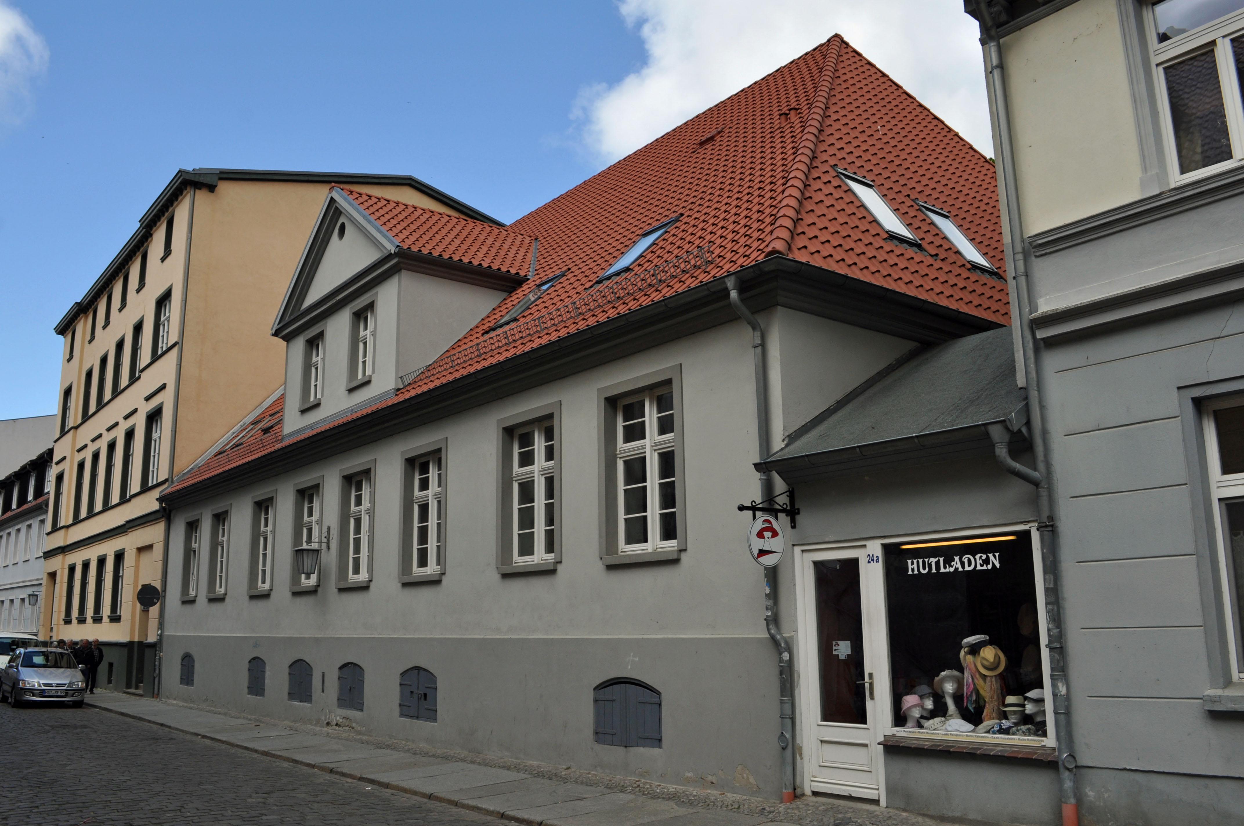 Gebäude in Stralsund, siehe Dateiname